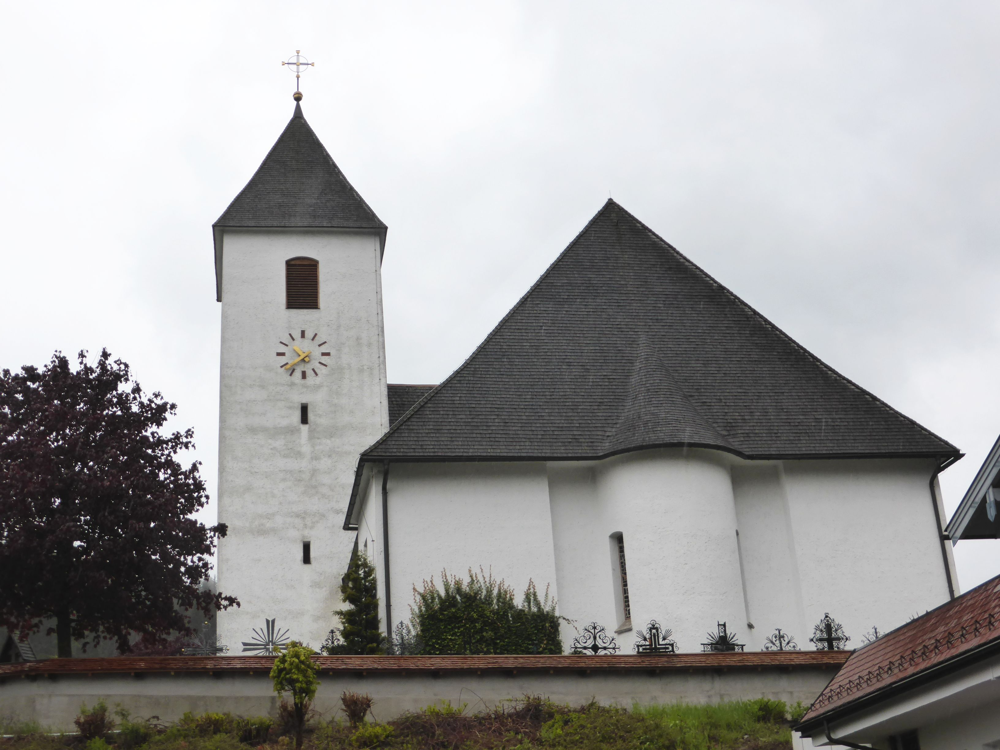 Kath. Pfarrkirche hl. Maria